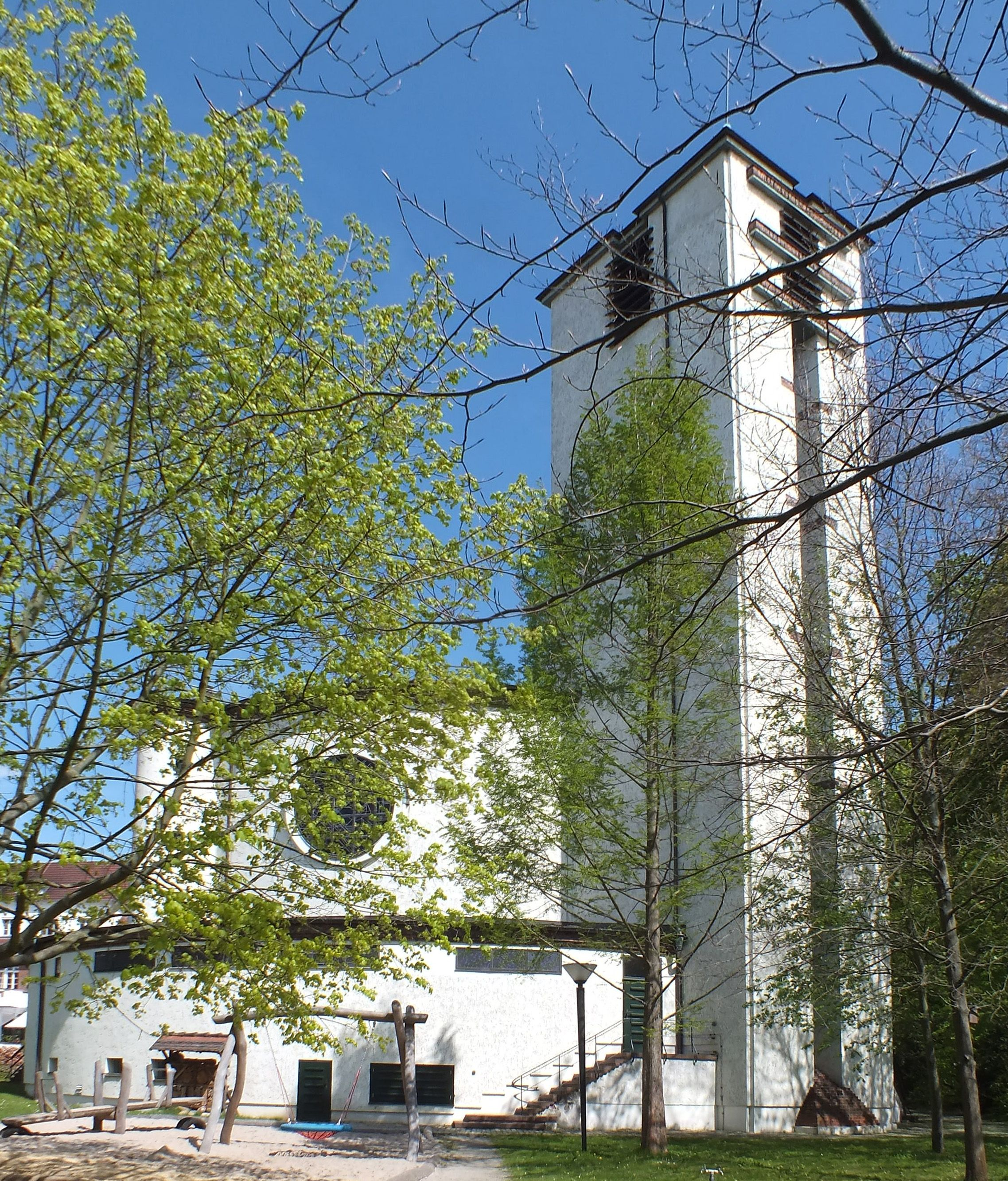 Die Kirche St. Bonifatius in Leipzig von Westen